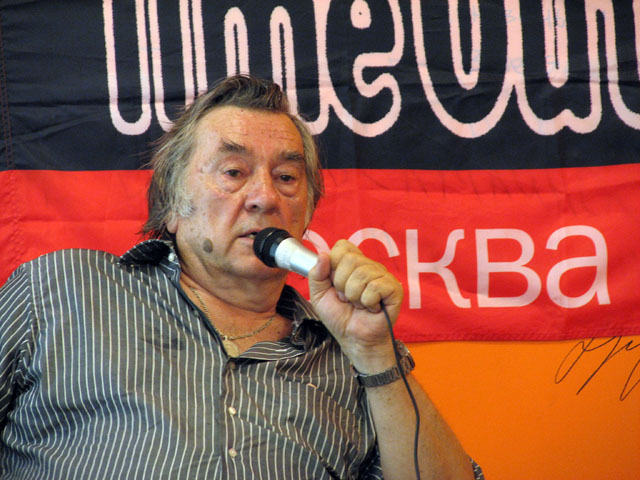 Александр Проханов на презентации своей книги «За оградой Рублёвки» 14 июня 2007 года, магазин «Букберри», Старая Басманная улица, г.Москва. Категория:Изображения:Писатели